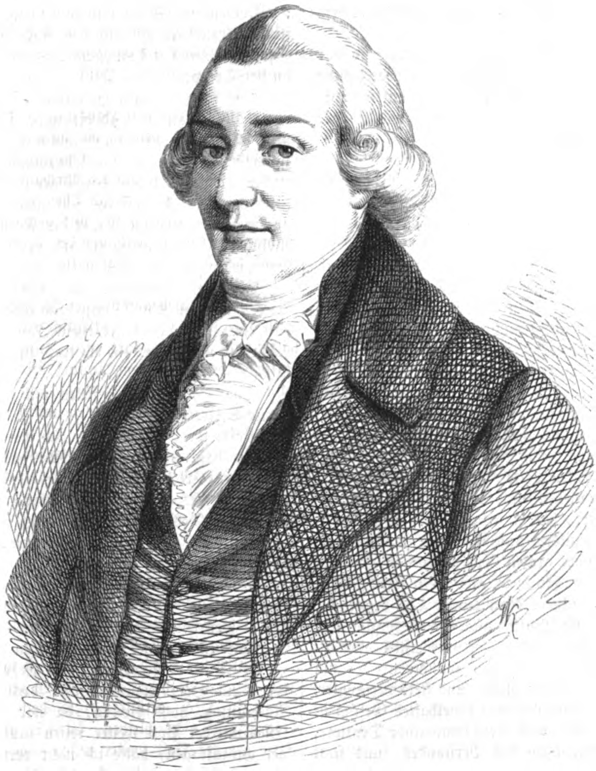 Johann Philipp Palm, deutscher Buchhändler, Freiheitskämpfer gegen Napoleon.